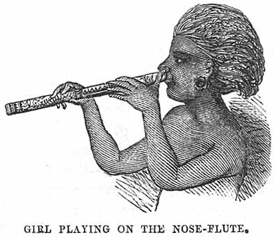 Fijian girl playing nose flute.